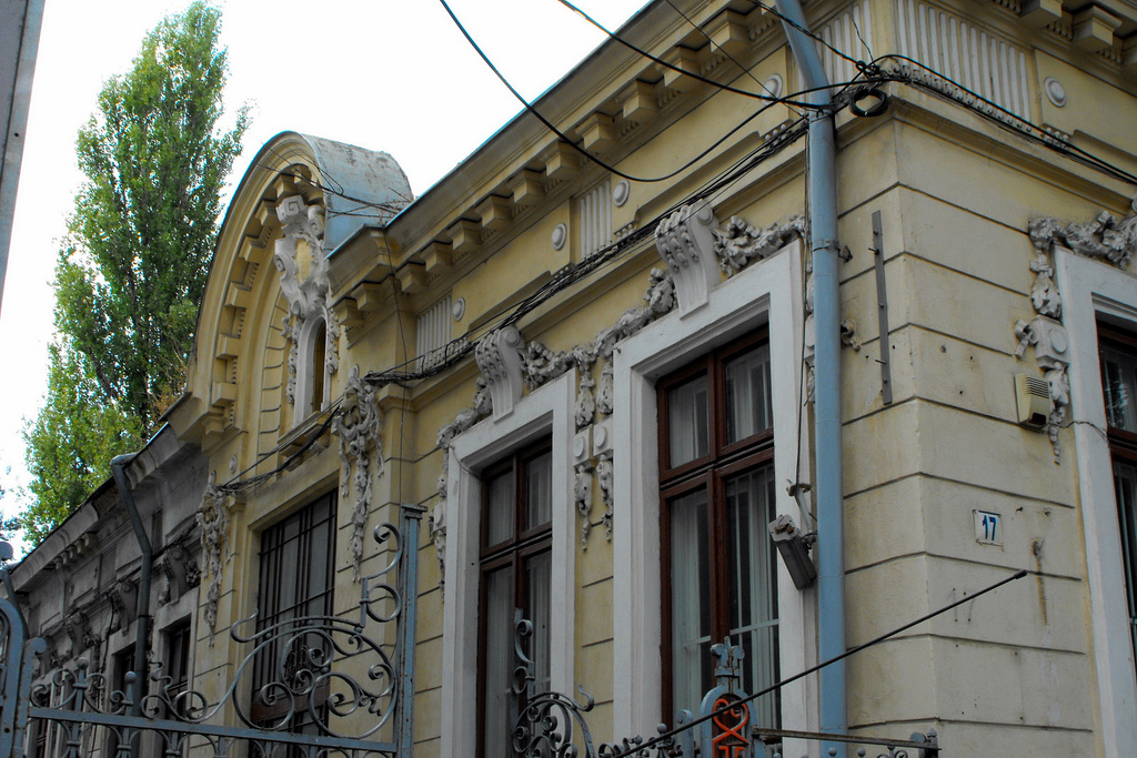 Polona 17